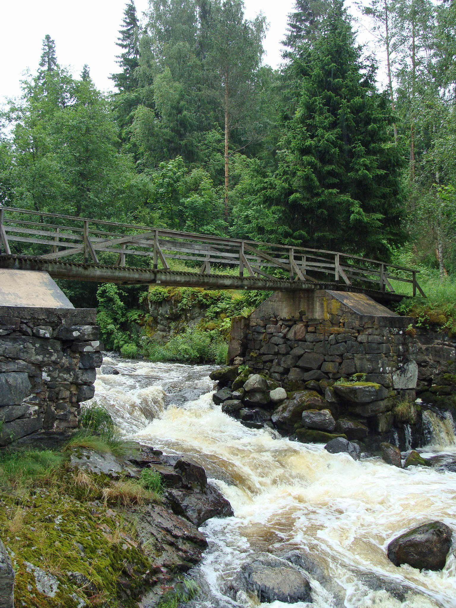 Аҧсшәа: kjhkjh